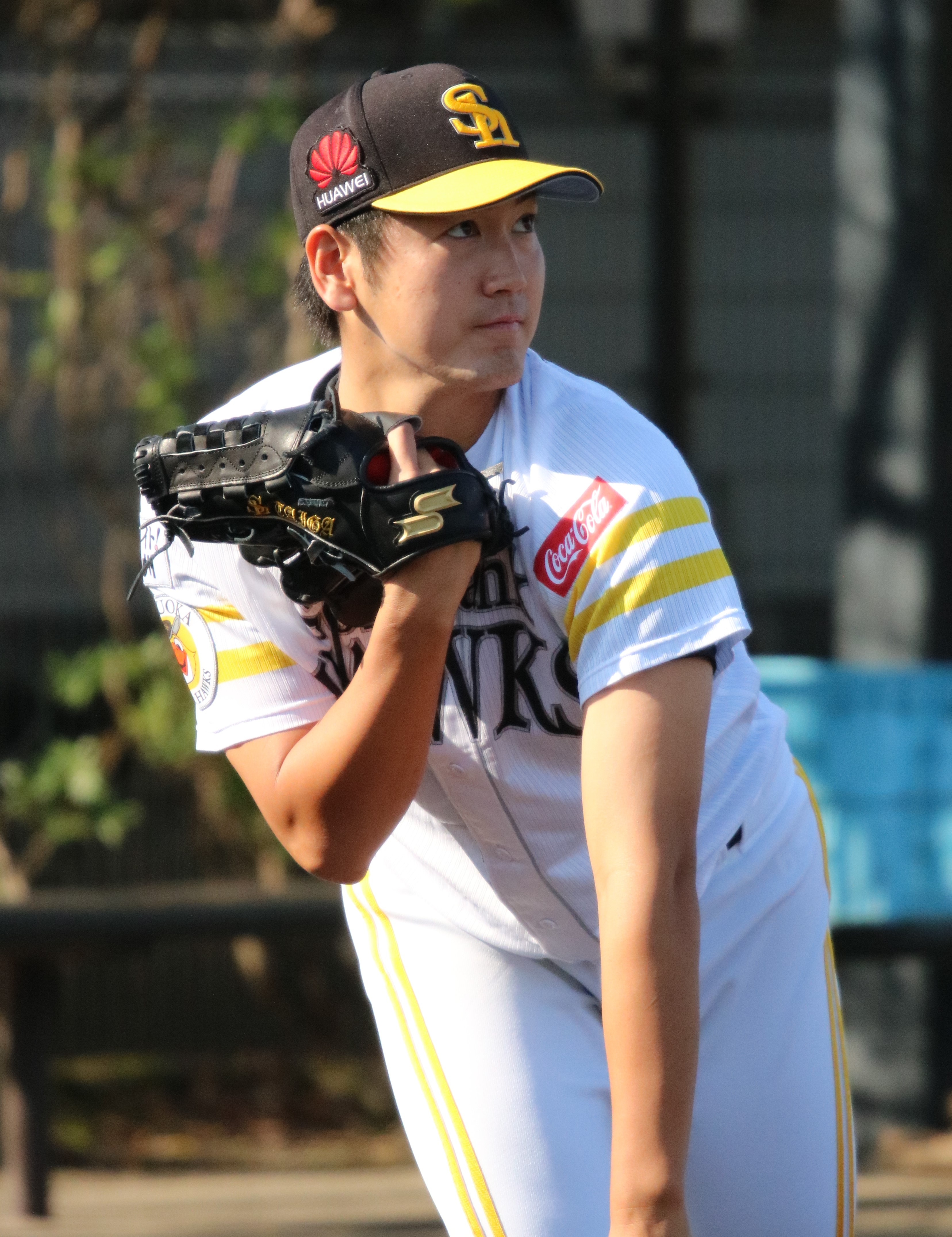 2017/11/11 宮崎秋季キャンプ